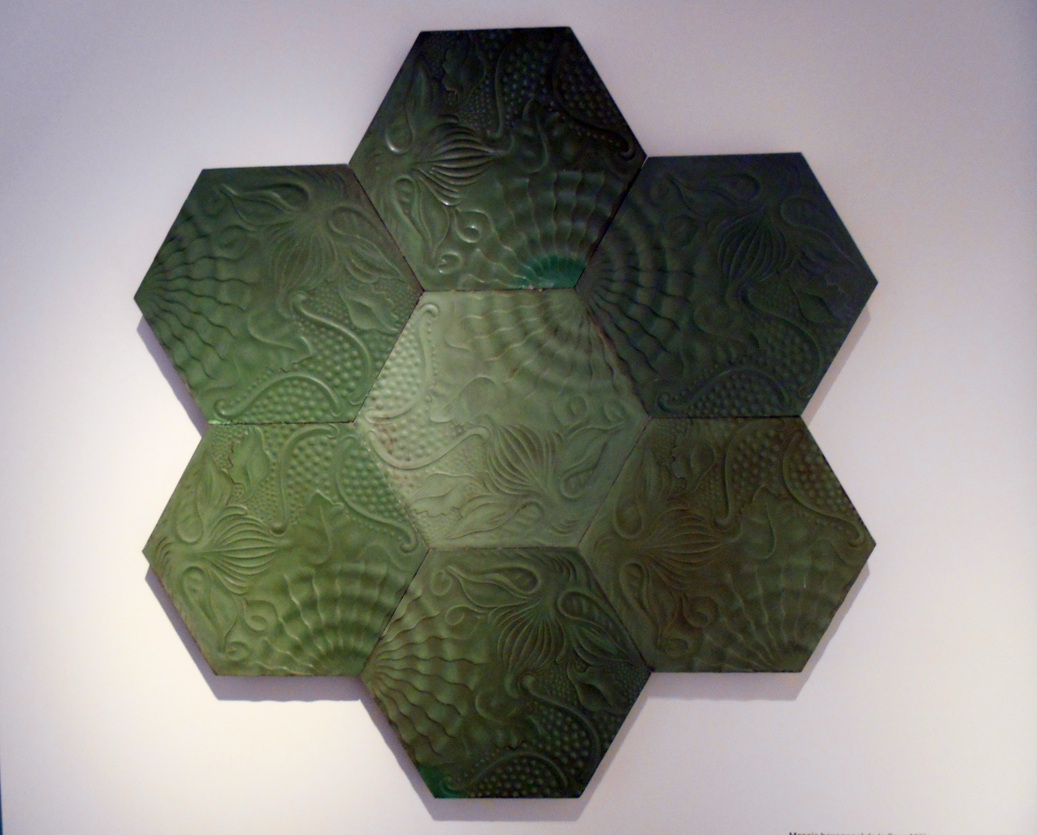 Loseta diseñada por Gaudí para el paseo de Gracia.